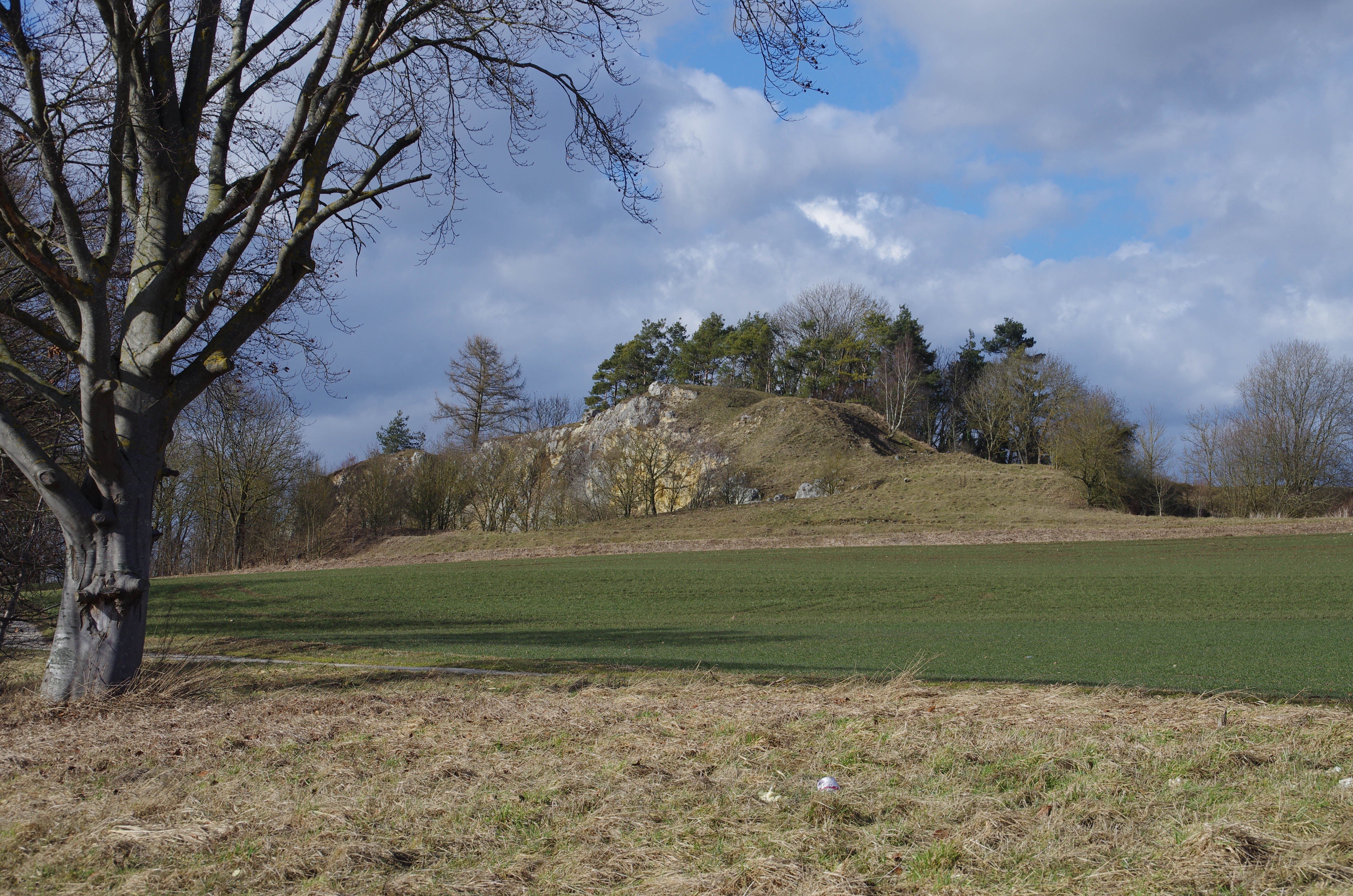 Siedlung des Neolithikums sowie Burgstall und Körpergräber des Mittelalters; hier: Blick auf die Burg vom Parkplatz südlich an der B25 herThis is a photograph of an architectural monument. 0104